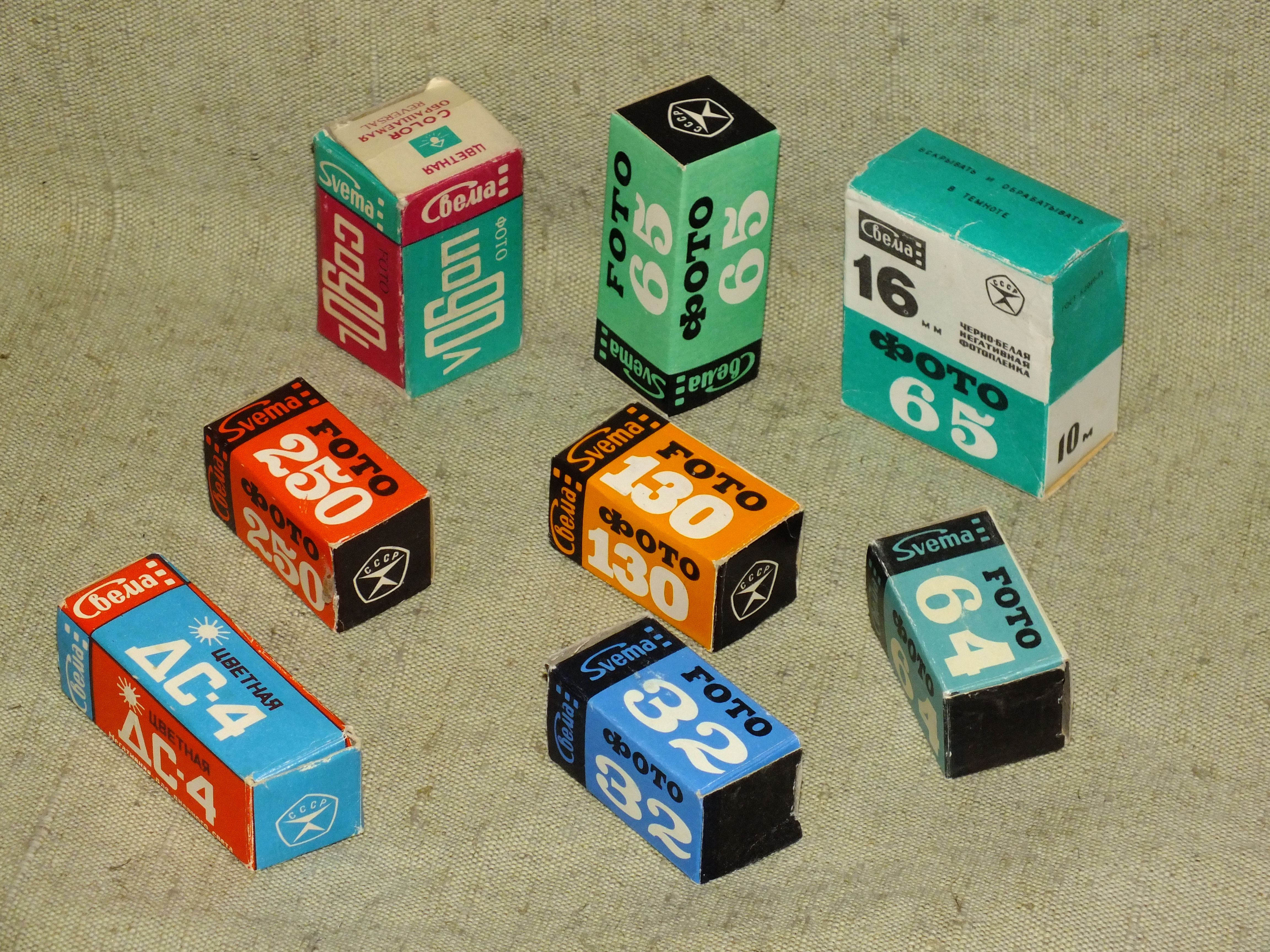 Фотоплёнки фирмы Свема